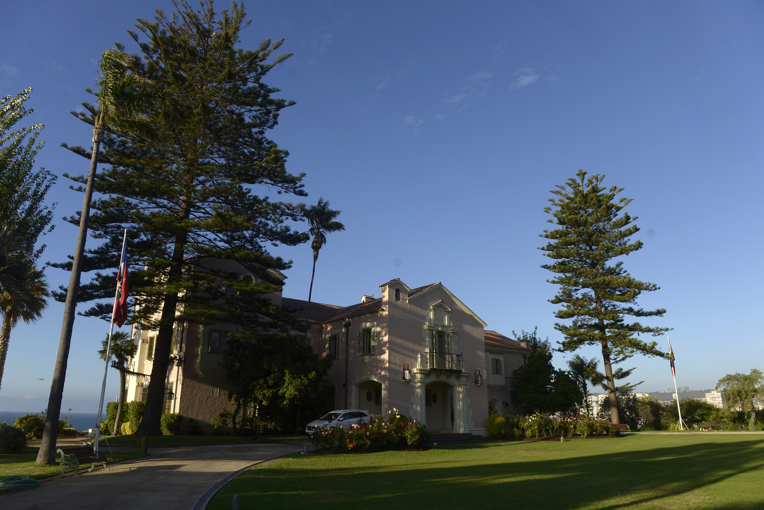 13 Enero 2016. Vocería desde Cerro Castillo de Ministro Marcelo Díaz por reunión de Pdta. Bachelet con Nueva Mayoría.